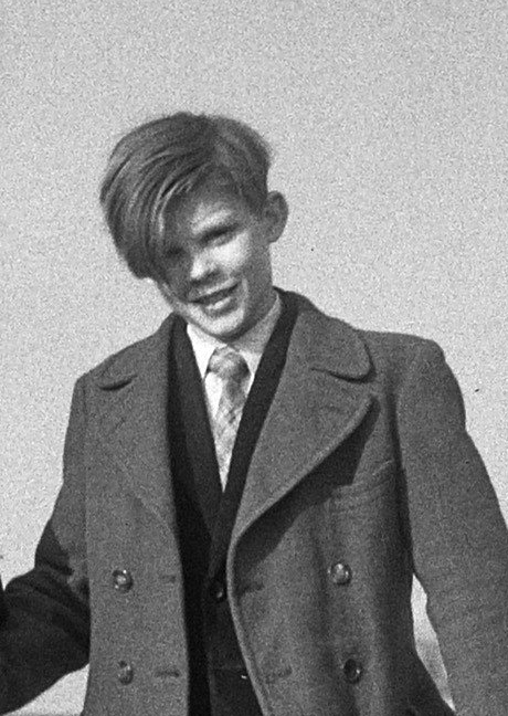 Georges Poujouly en 1953 lors d'un voyage aux Pays-Bas (Schipol airport).